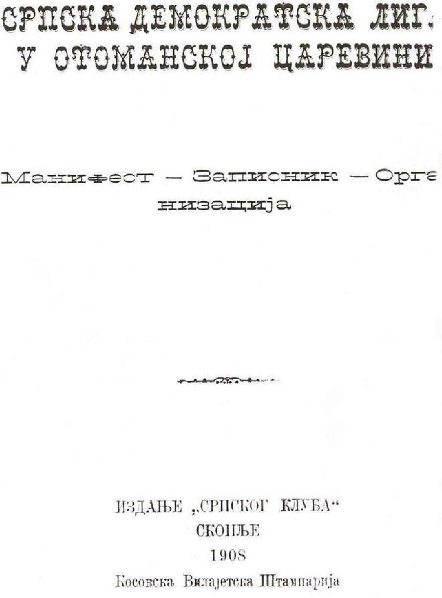 Манифест на Сръбската демократическа лига